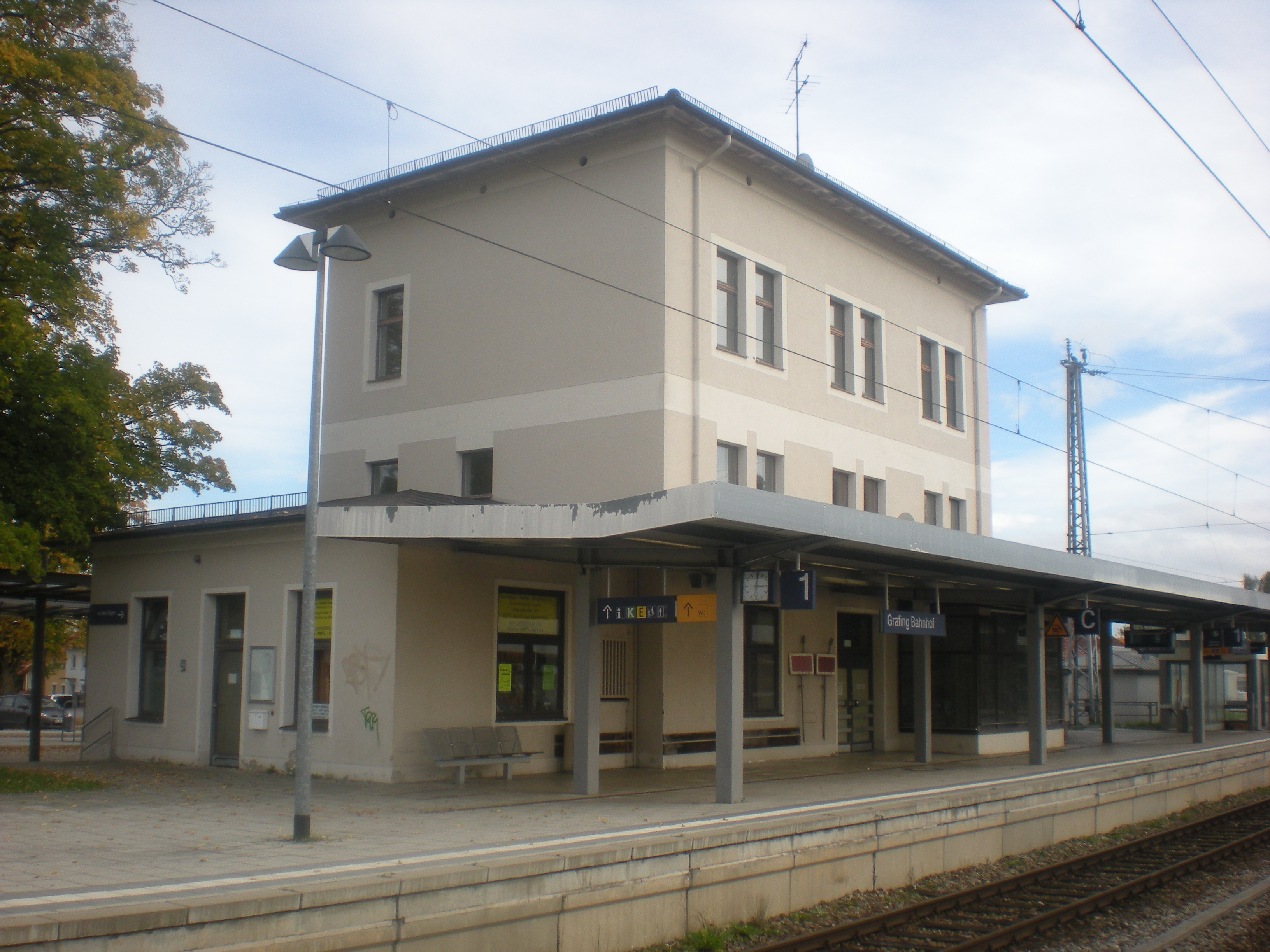 Empfangsgebäude des Grafinger Bahnhofs von der Gleisseite